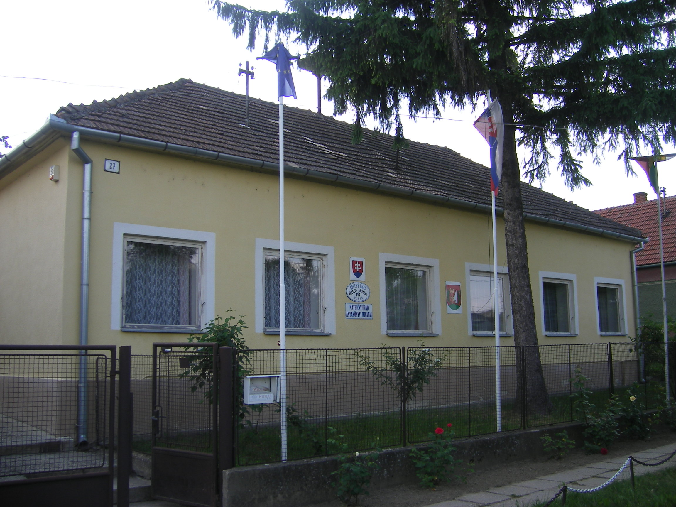 Für - községi hivatal